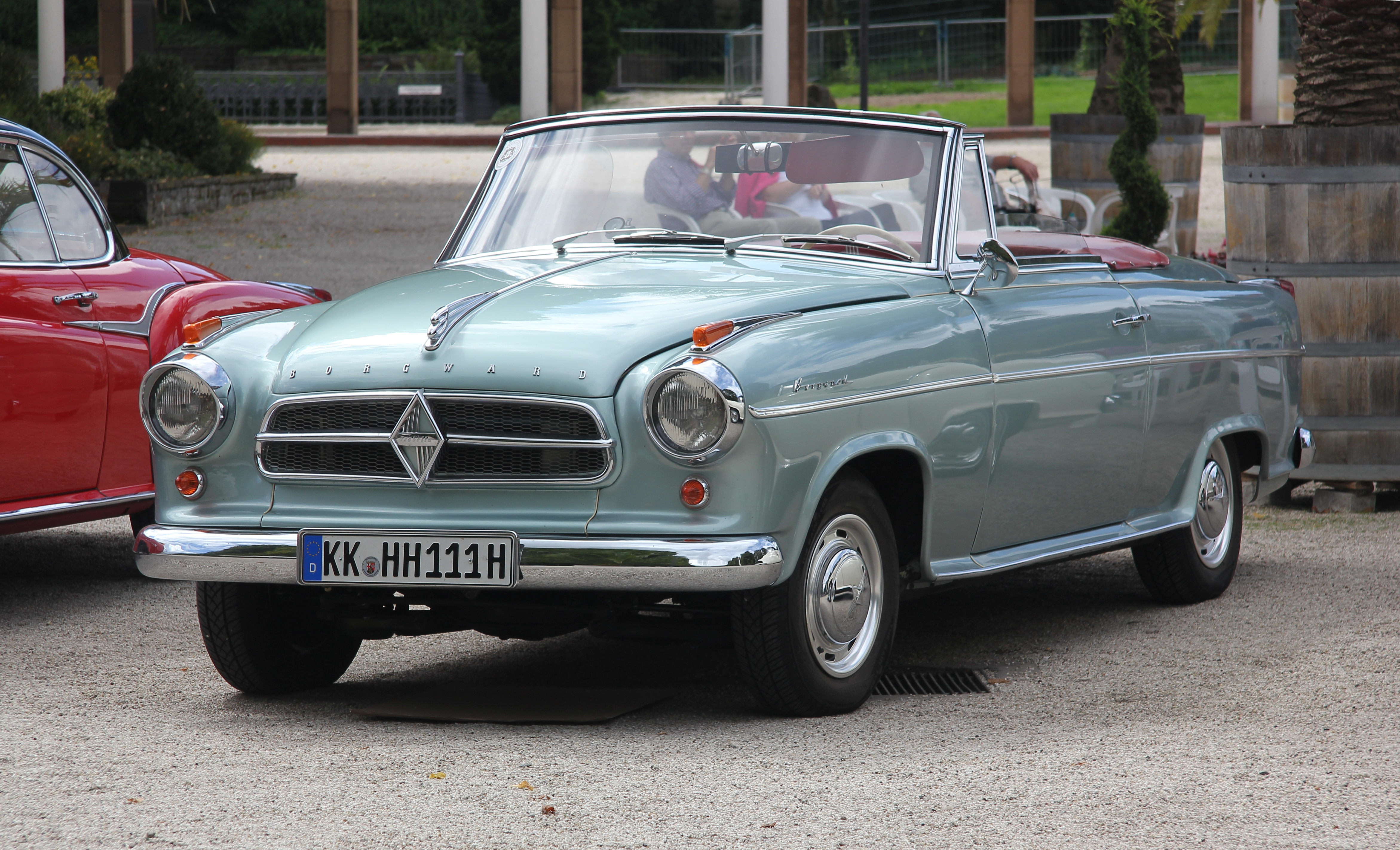 Borgward Isabella Cabriolet (Kennzeichen des Fahrzeugs verändert)